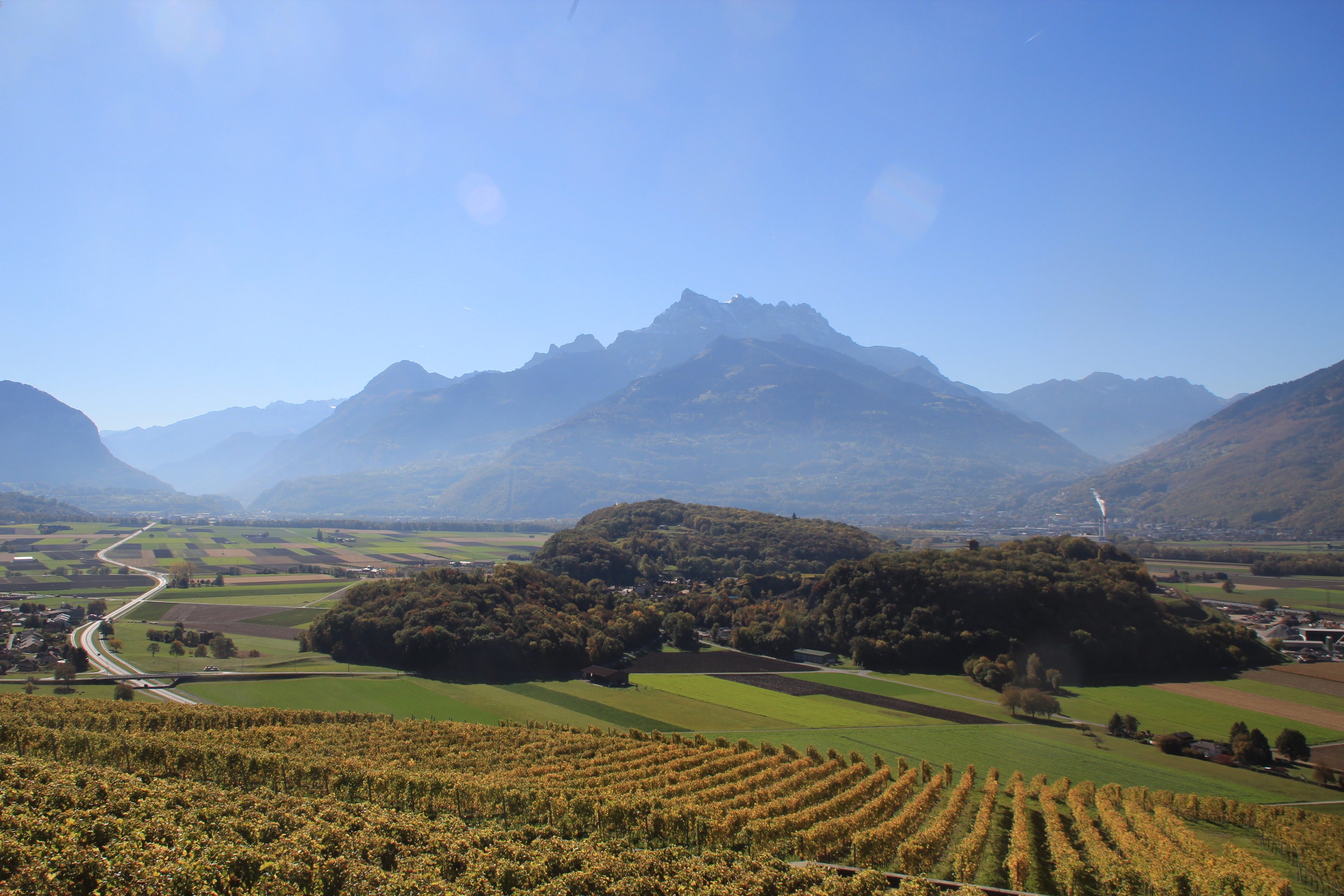 Rebberge bei Ollon St. Tiphon